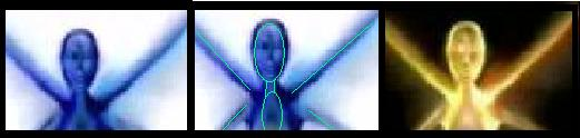 Intro DWAD Intro of Fairy